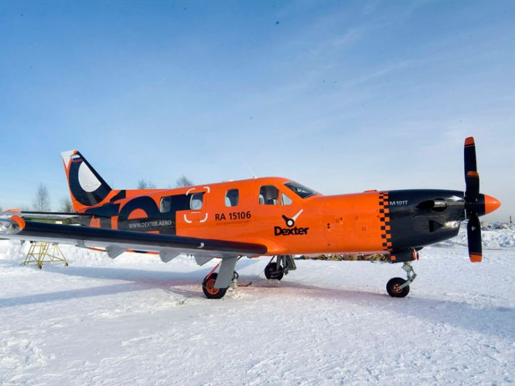 Авиатакси в Липецке